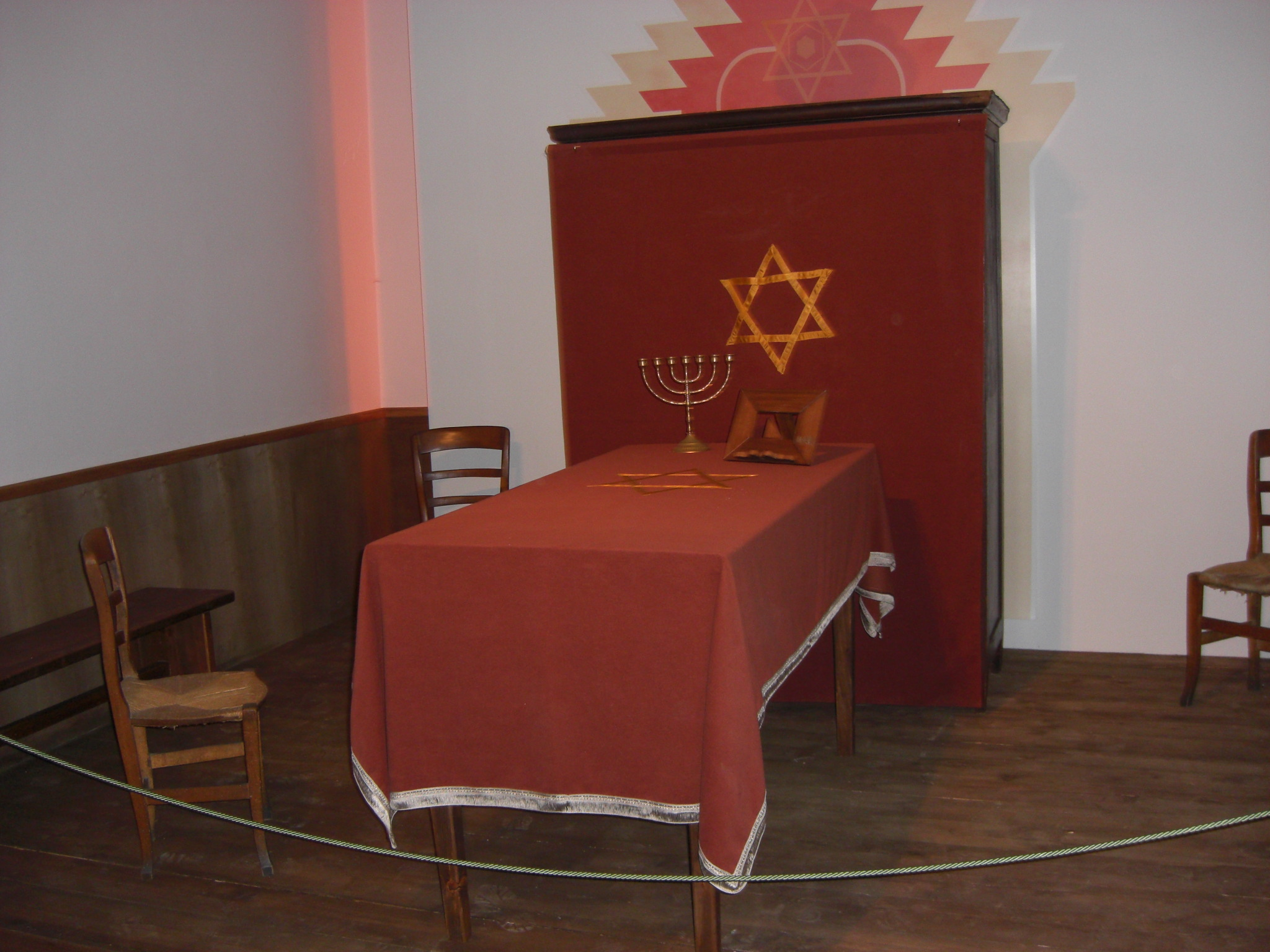 Ricostruzione della sinagoga concessa agli internati del campo di Campagna